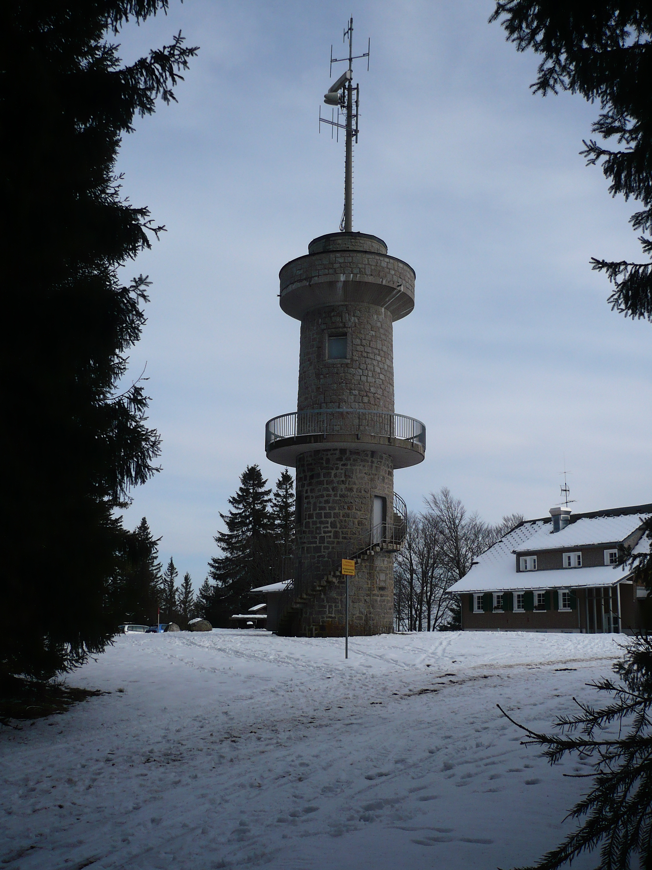 Am Brendturm